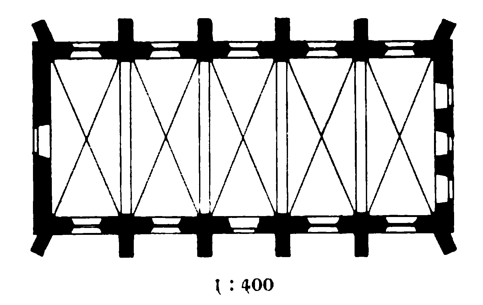 Grundriss der Kirche St. Vitus in St. Vit, Stadt Rheda-Wiedenbrück